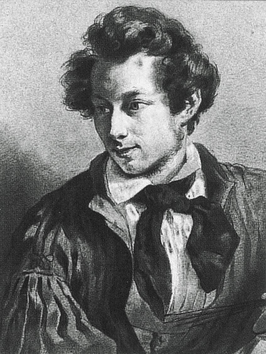 Portret van Petrus Kiers (1807-1875)